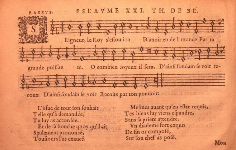 Les cent cinquante pseaumes de David mis en rime francoise par Clement Marot et Theodore de Bèze, et mis en musique à quatre et à cinq parties... seconde edition. - Lyon : Philibert Jambe de Fer, Pierre Cussonel et Martin La Roche, 1564, impr. Pierre de Mia). 4 vol. 8° obl.